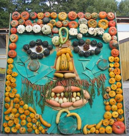 Kürbisarrangement, Skulpturenpark Lehnin, Brandenburg / Jährlich im September Kürbisfest in Lehnin. Im Rahmen des Festes war der Skulpturenpark am Klostersee noch im Oktober 2004 voller skurriler Kürbisarrangements bis in den See hinein.